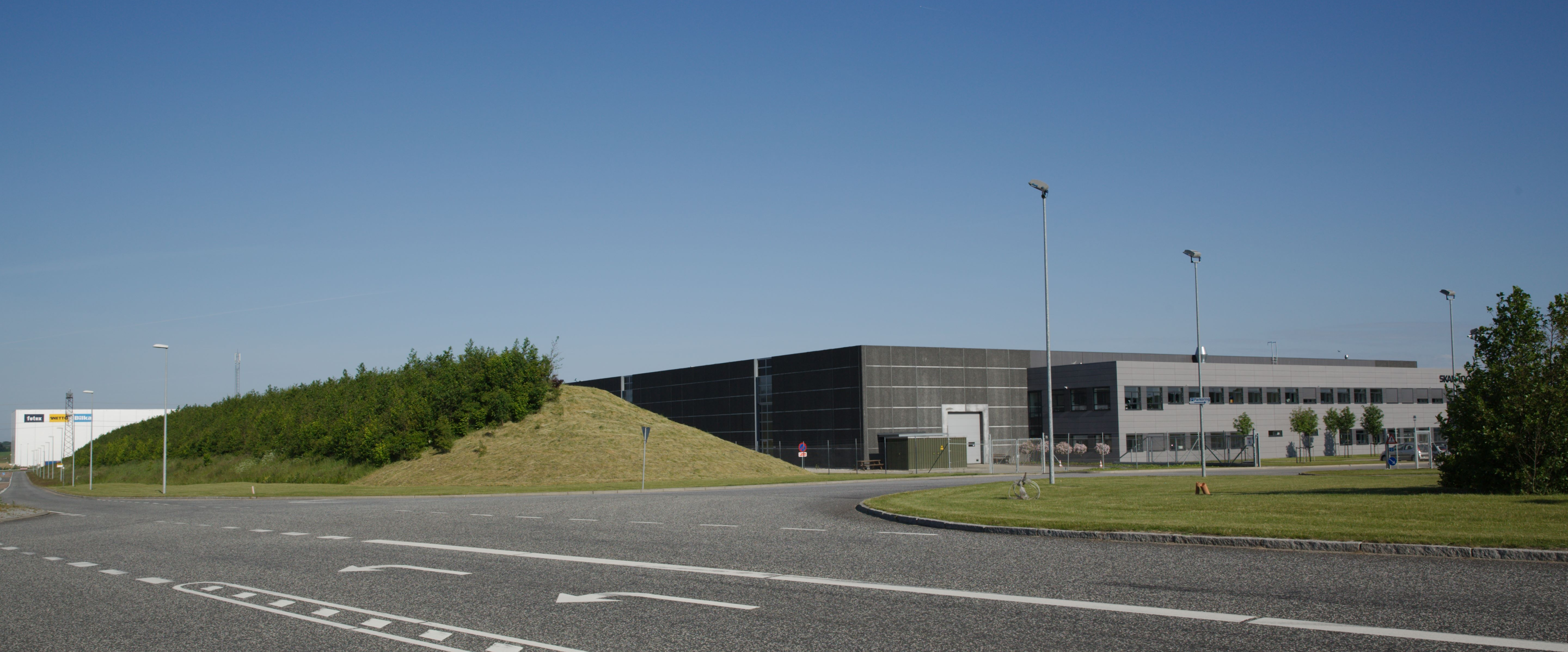 Transportcenteret ved Logistikparken